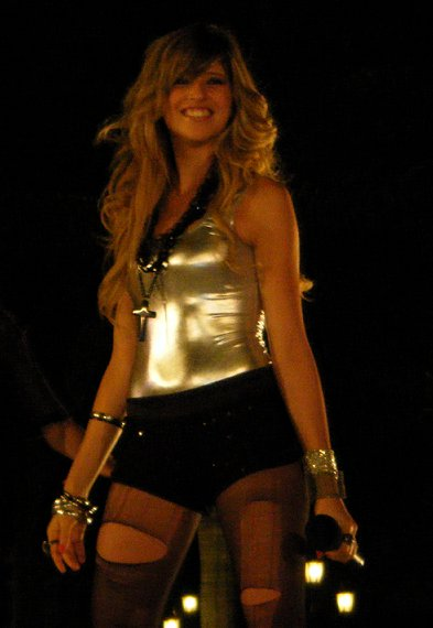 Anna Carina cantando en pasarela de: Lima esta de moda.